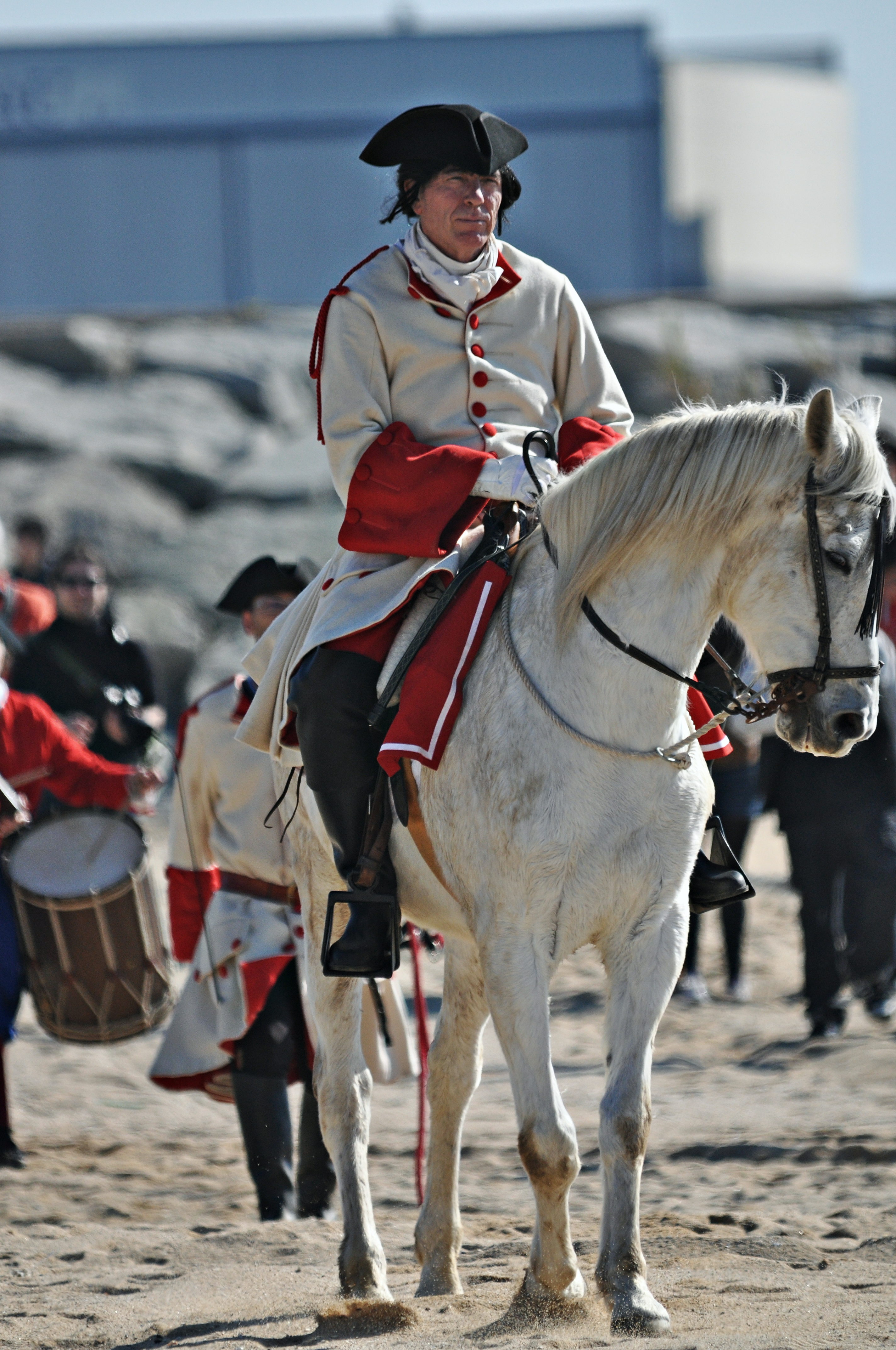 desembarco de los miquelets en arenys